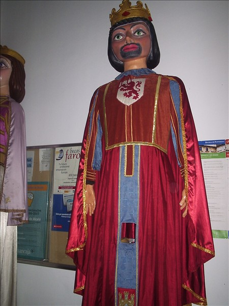 Gigantes de Alcalá de Henares